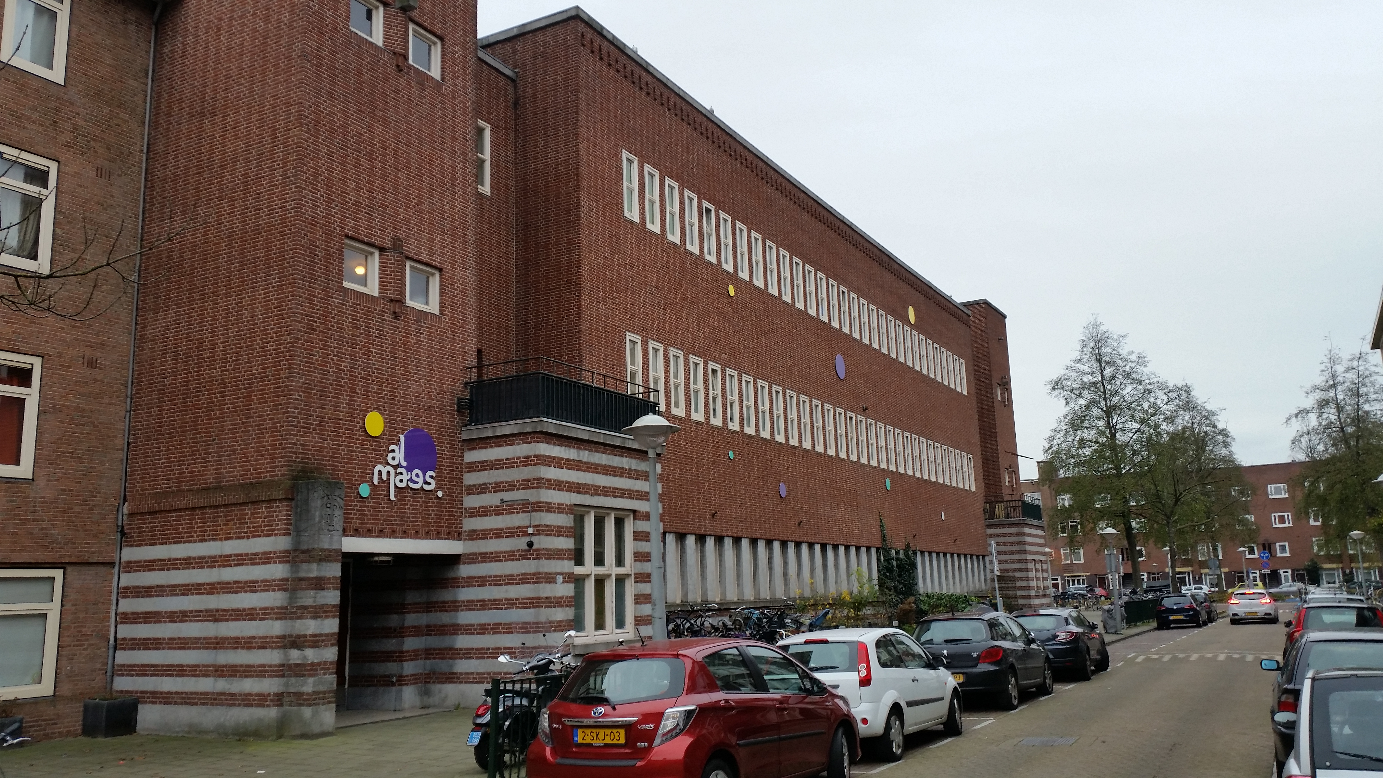 Dubbele school van Karel Petrus Tholens